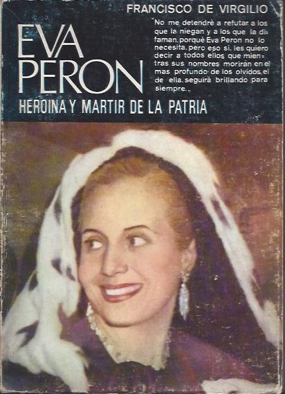 EVA PERON - Heroina Y Martir De La Patria